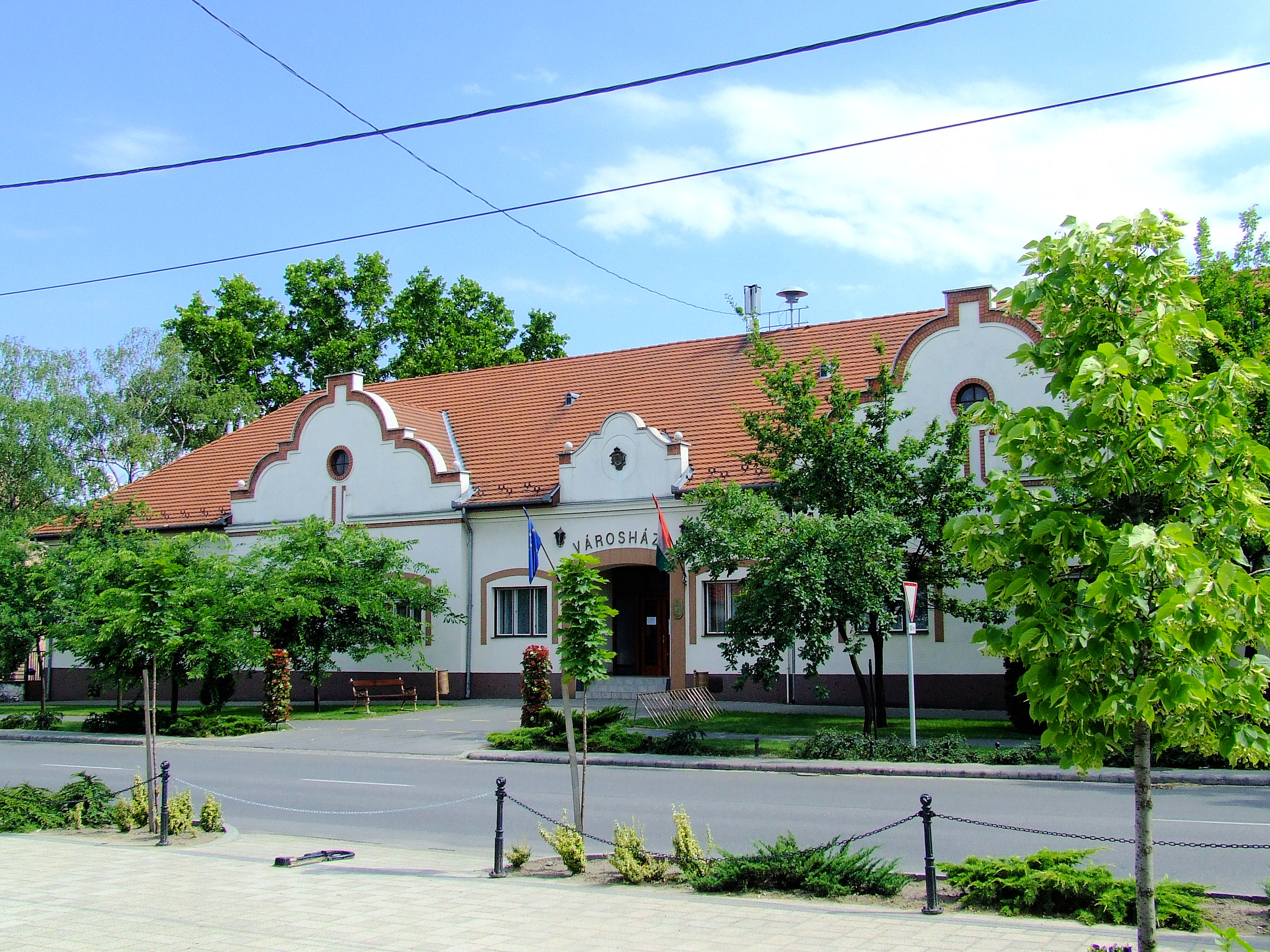 A soltvadkerti városháza. Az egykori Lukács-kúria az 1820-as években épült